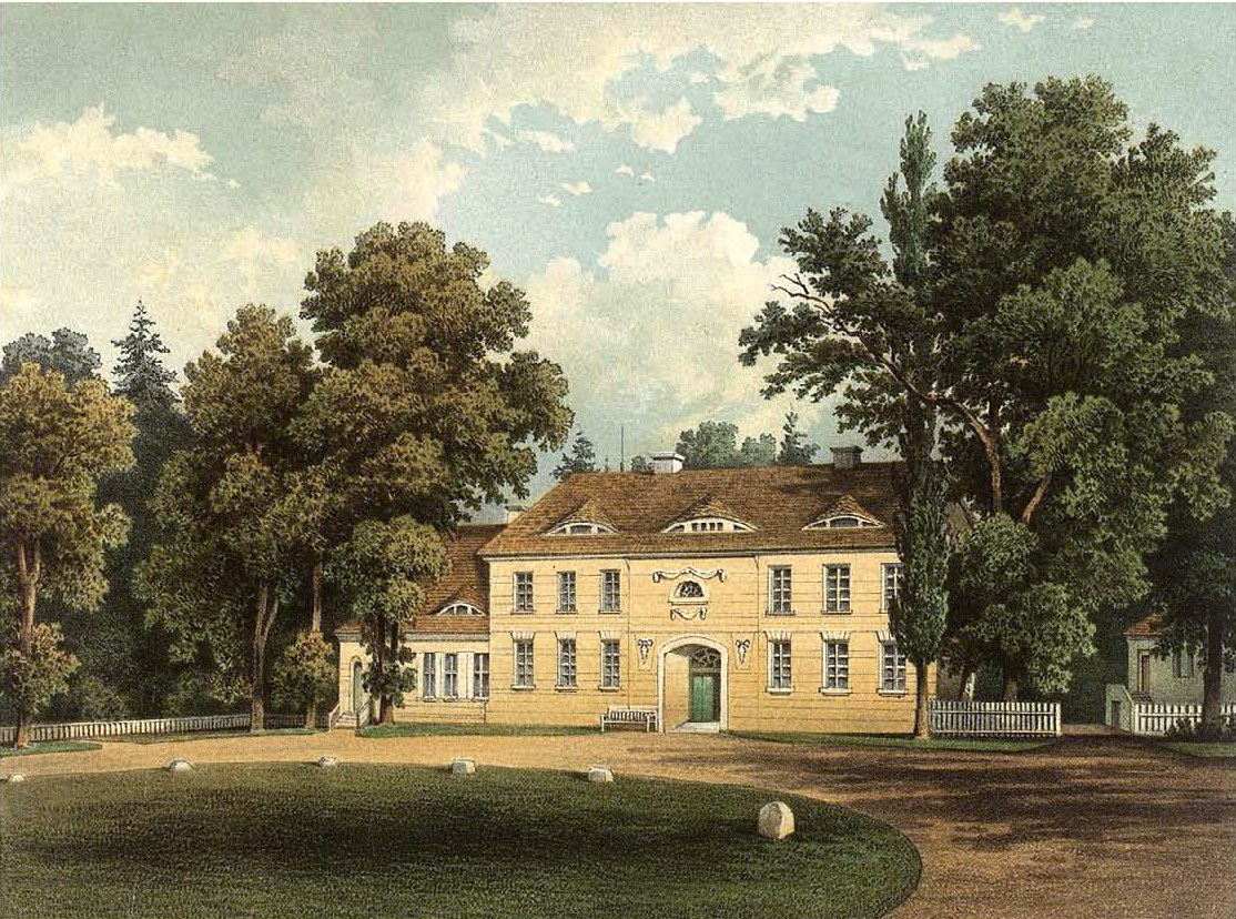 Rittergut Bootz, Kreis West-Prignitz